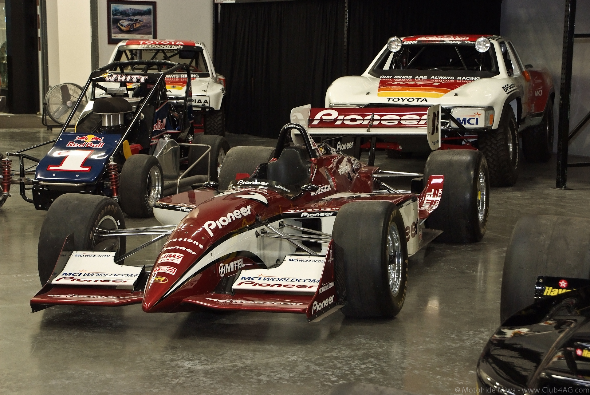 2011_11_26_Toyota_HQ-20-36